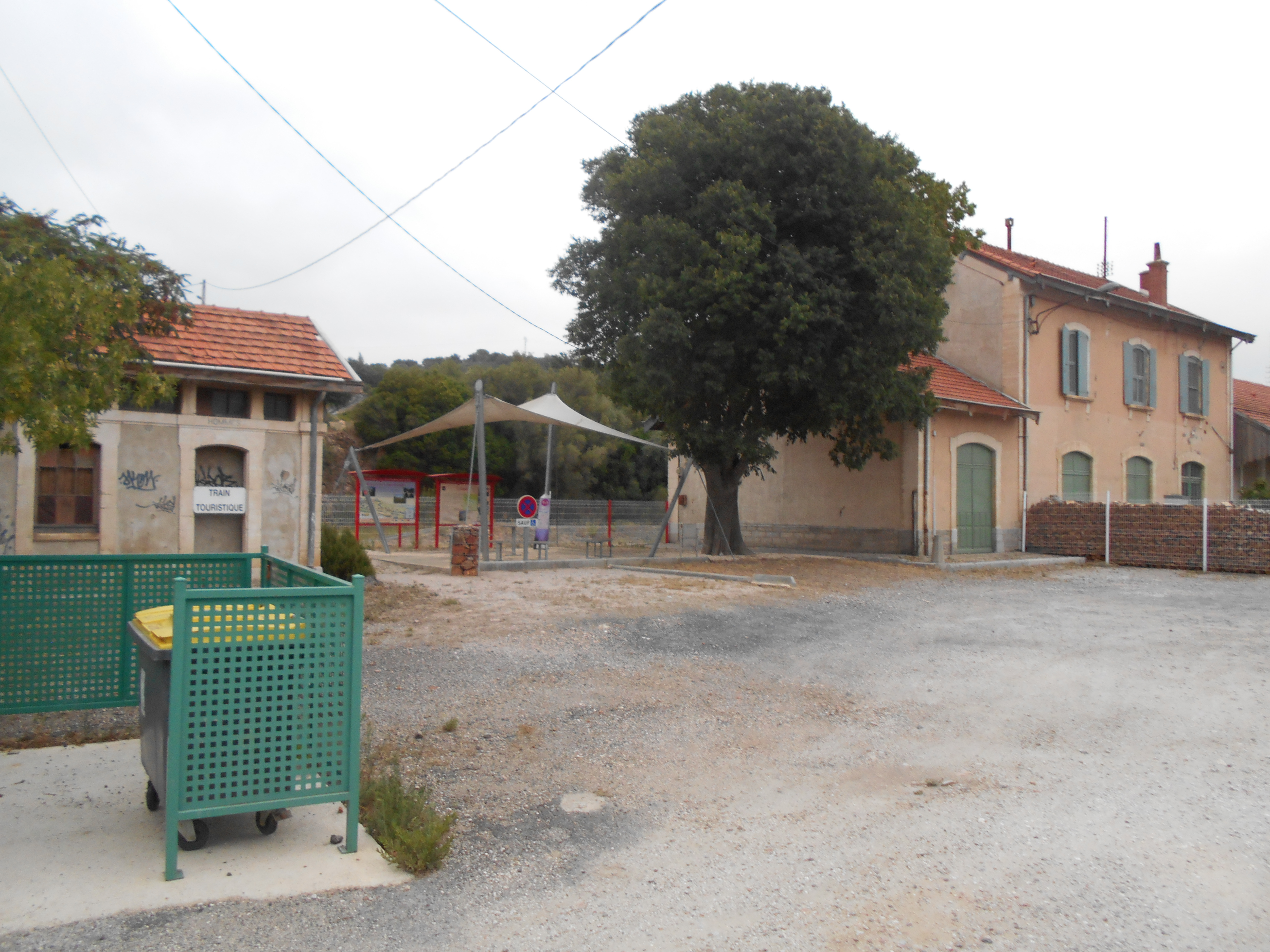 L'Estació d'Estagell